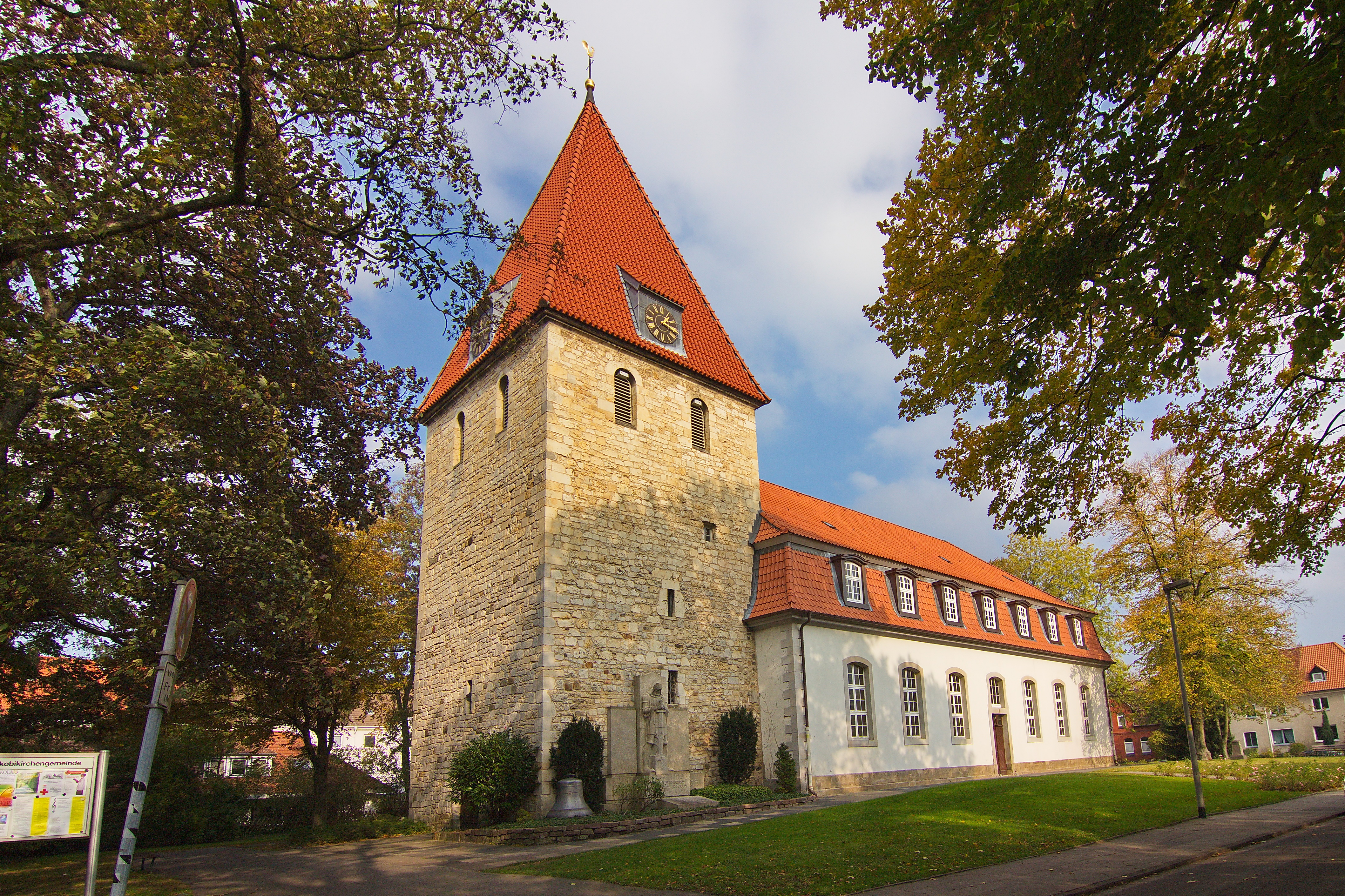 Jakobikirche am Kleinen Hillen in Kirchrode (Hannover), Niedersachsen, Deutschland